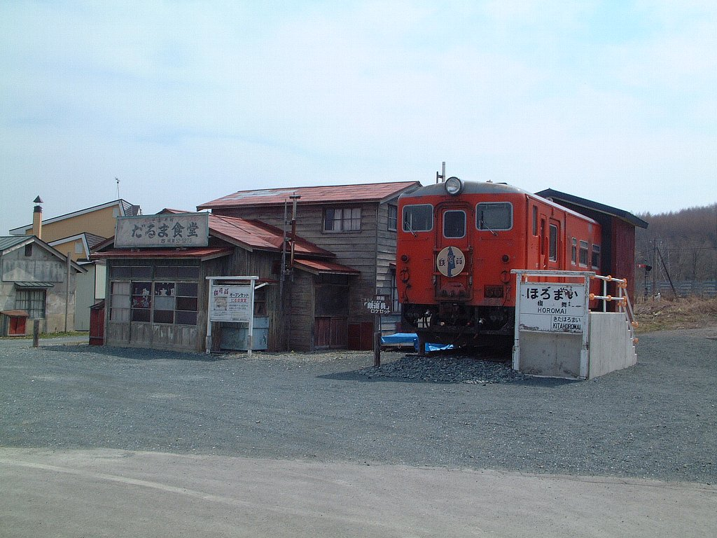 JR北海道幾寅駅前にある、鉄道員（ぽっぽや）のロケが行われた場所。